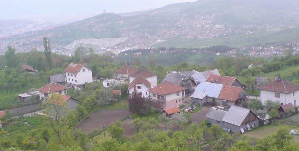 Мрковићи, 2008. године